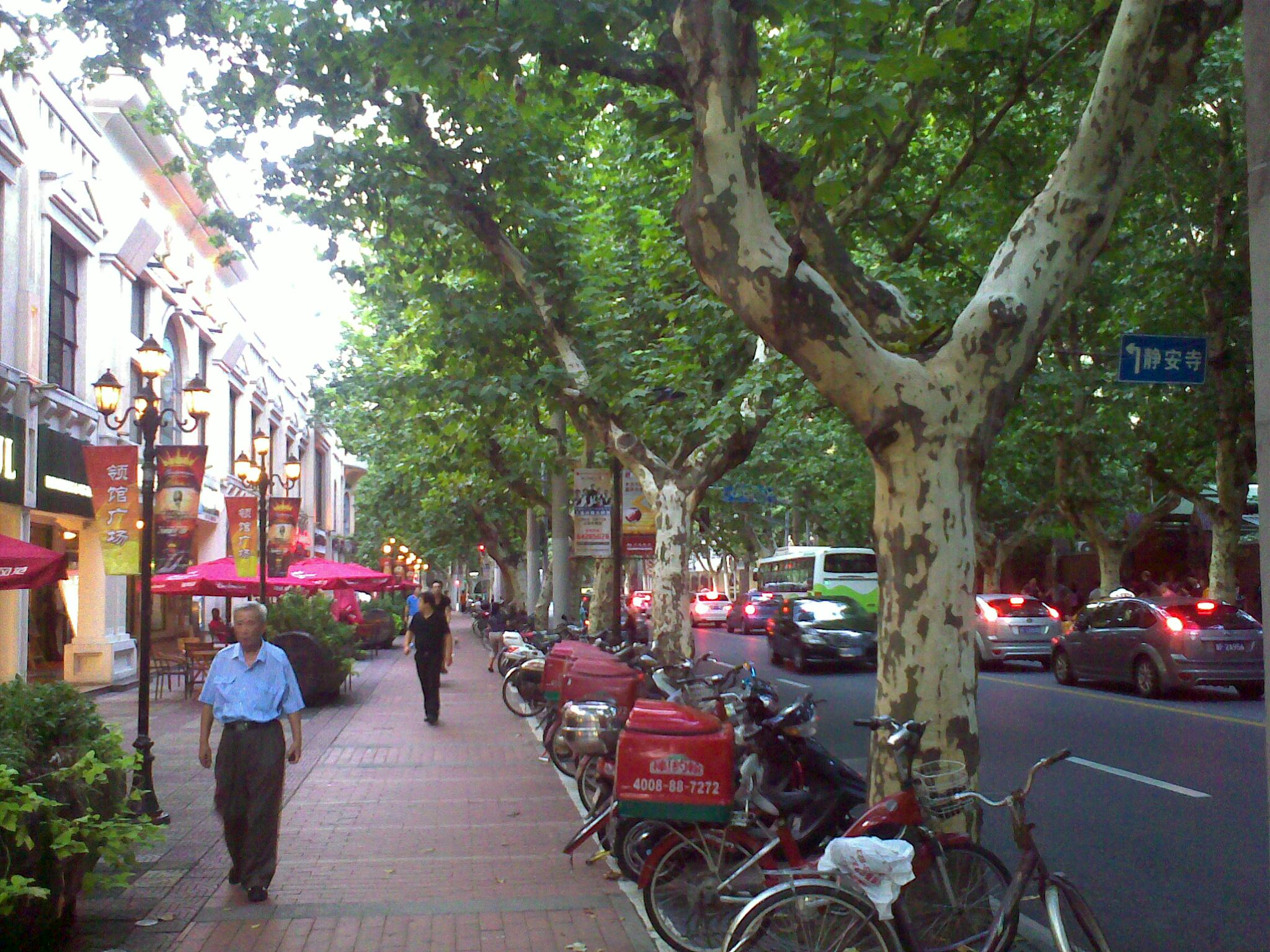 Hengshan allé sett mot nordøst ved Ürümqigaten